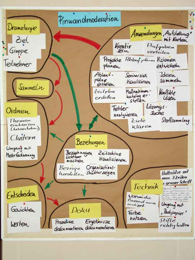 Pinwandmoderation: Bezüge herstellen